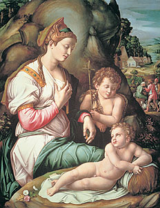 Madonna